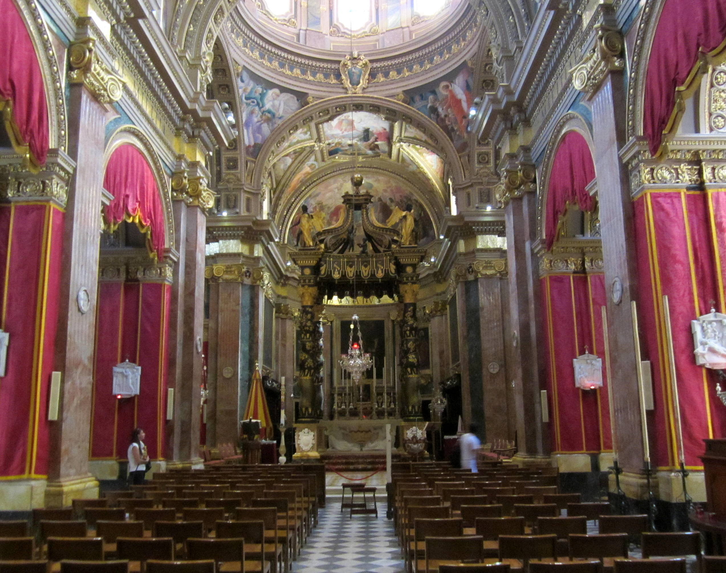 Interno della Chiesa di San Giorgio a Victoria